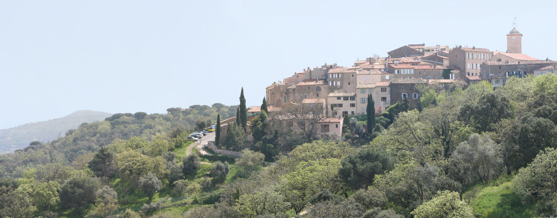 Vue de Ramatuelle (Var), au mois d'avril 2010.